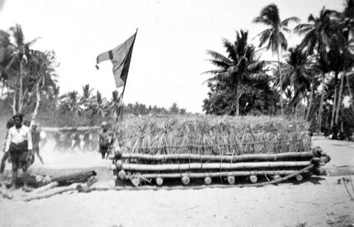 Repronegatif. Batu penutup kubur diselubungi oleh anyaman rumput untuk melindungi selama pengangkutan. Tiang yang dibalut kain menunjukkan bahwa batu itu diperuntukkan bagi seorang raja. Sumba Timur